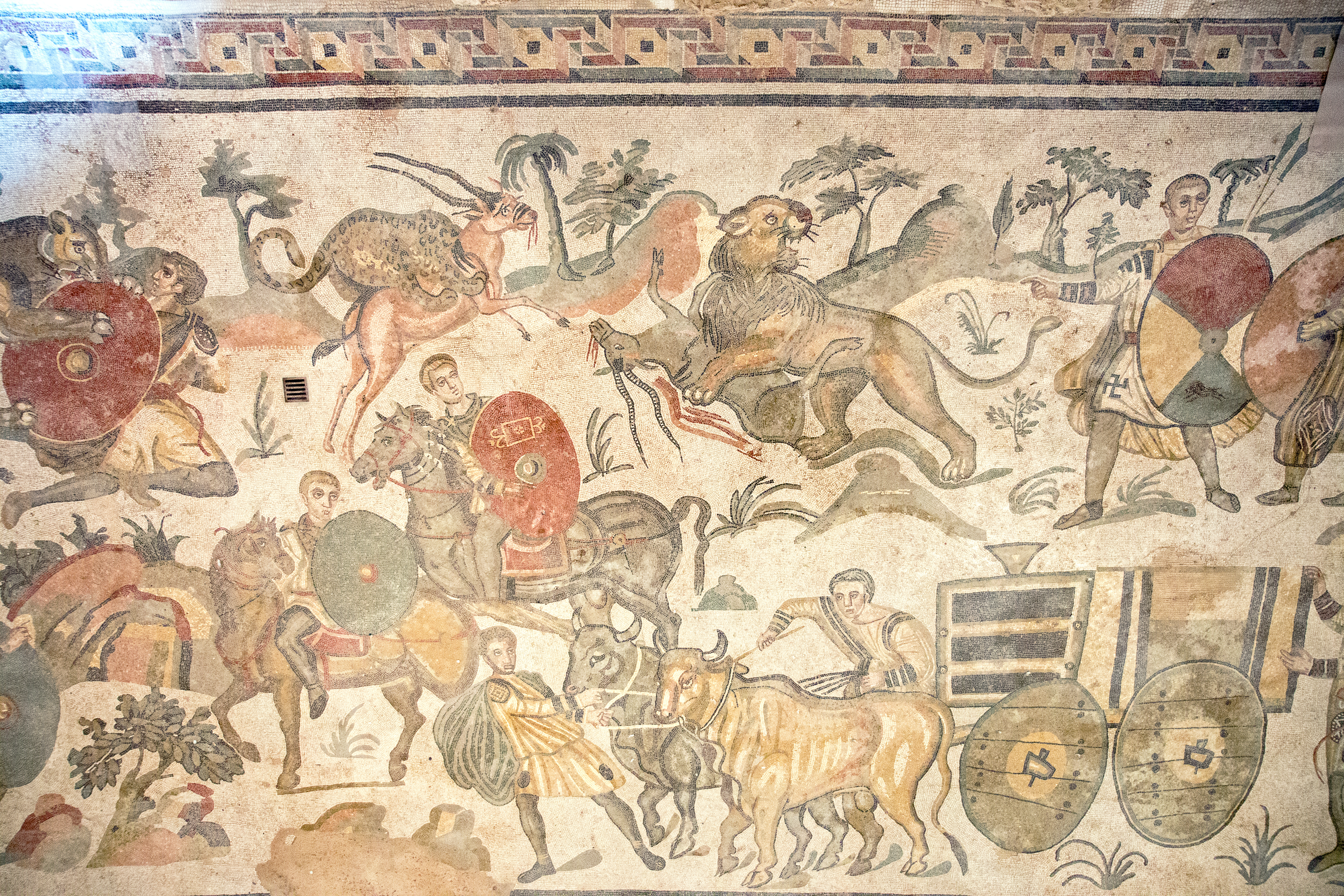 Full collection of Villa Romana del Casale photos here